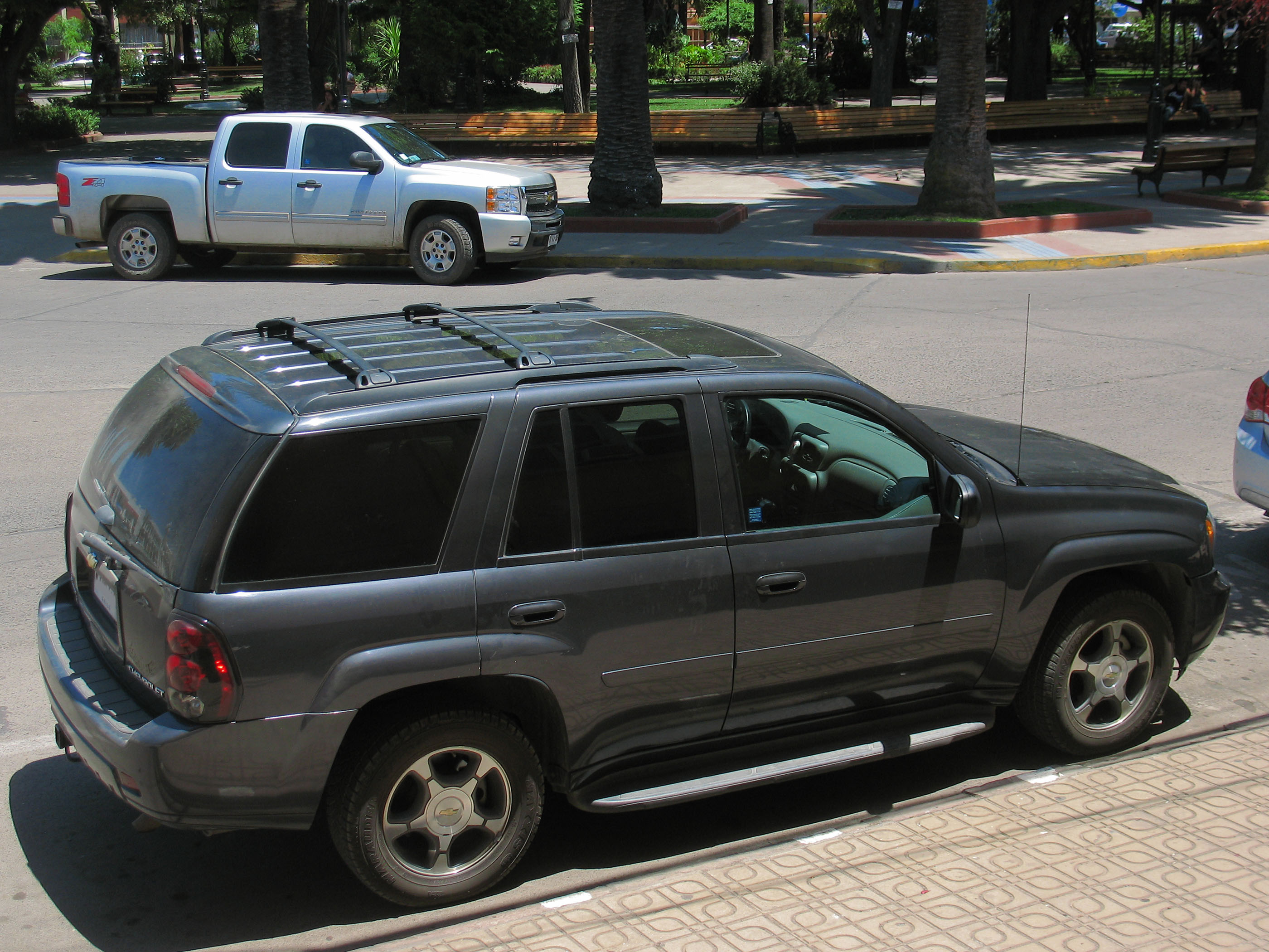 Chevrolet Trailblazer LT 2007